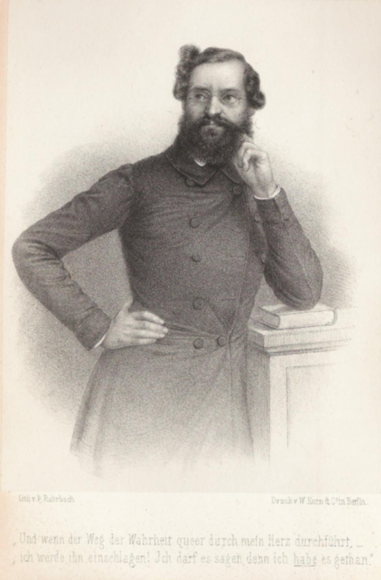 Bildnis Heinrich Simon (Lithographie)